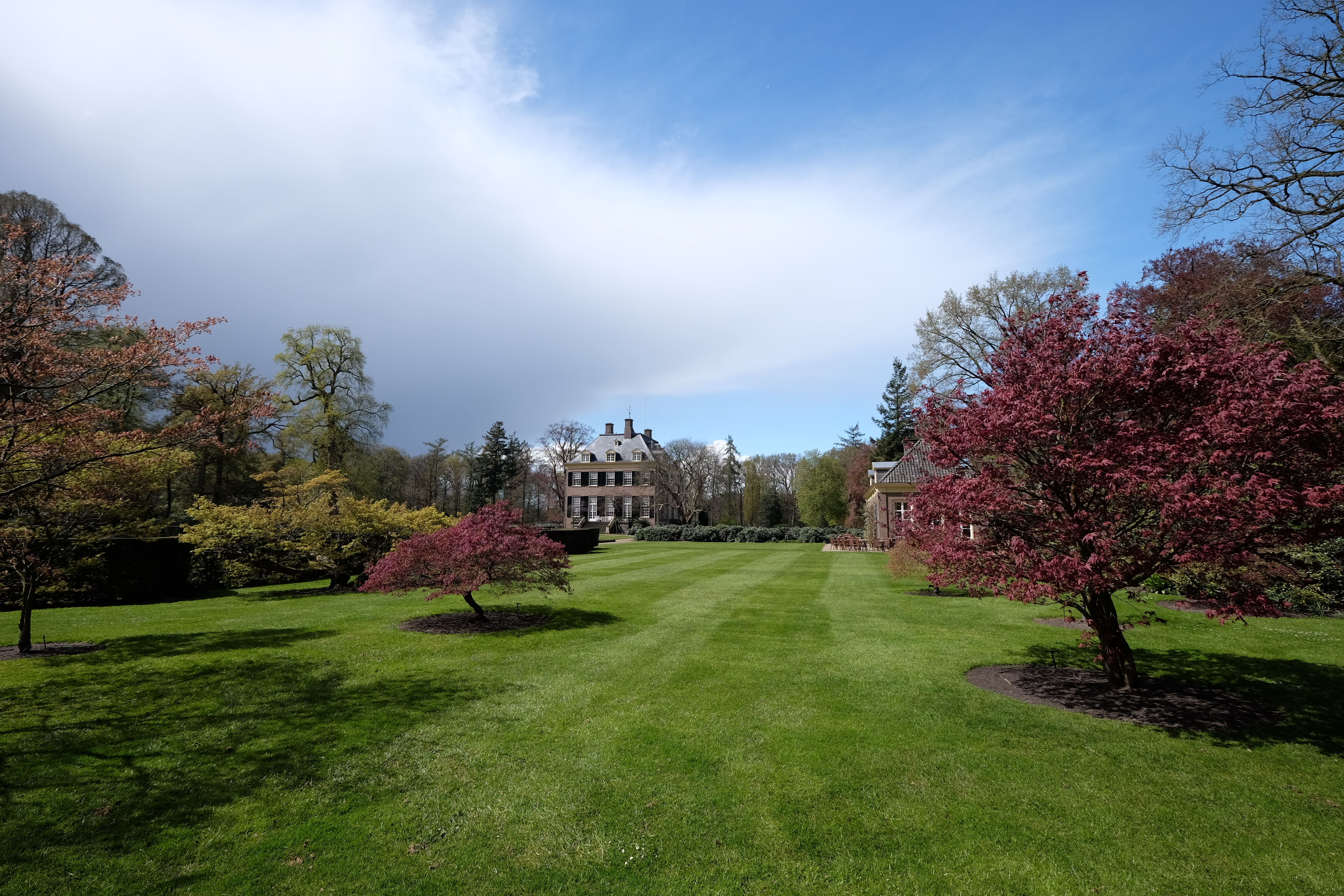 Huis Verwolde